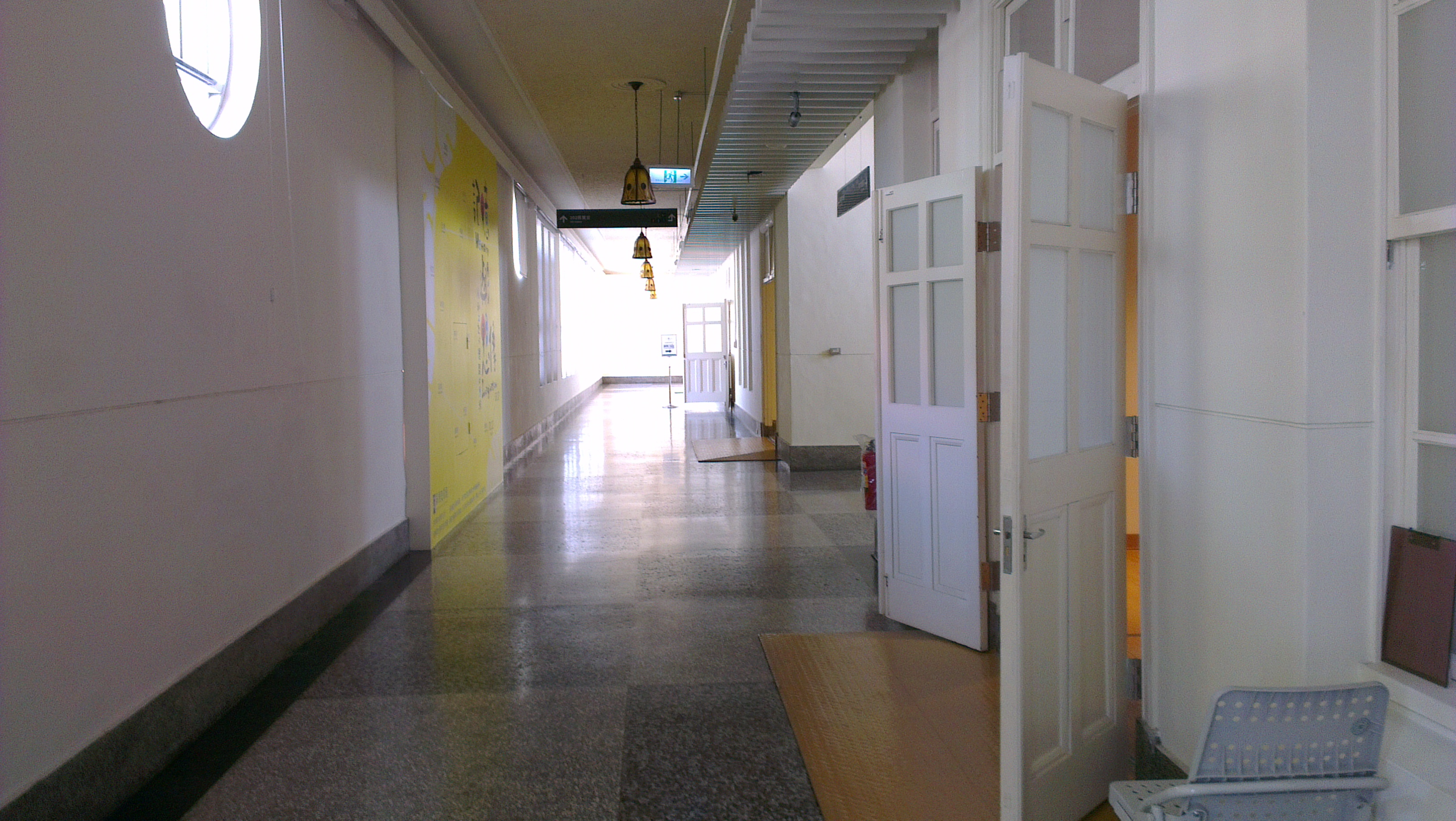 中文（台灣）: 屏東美術館二樓走廊。